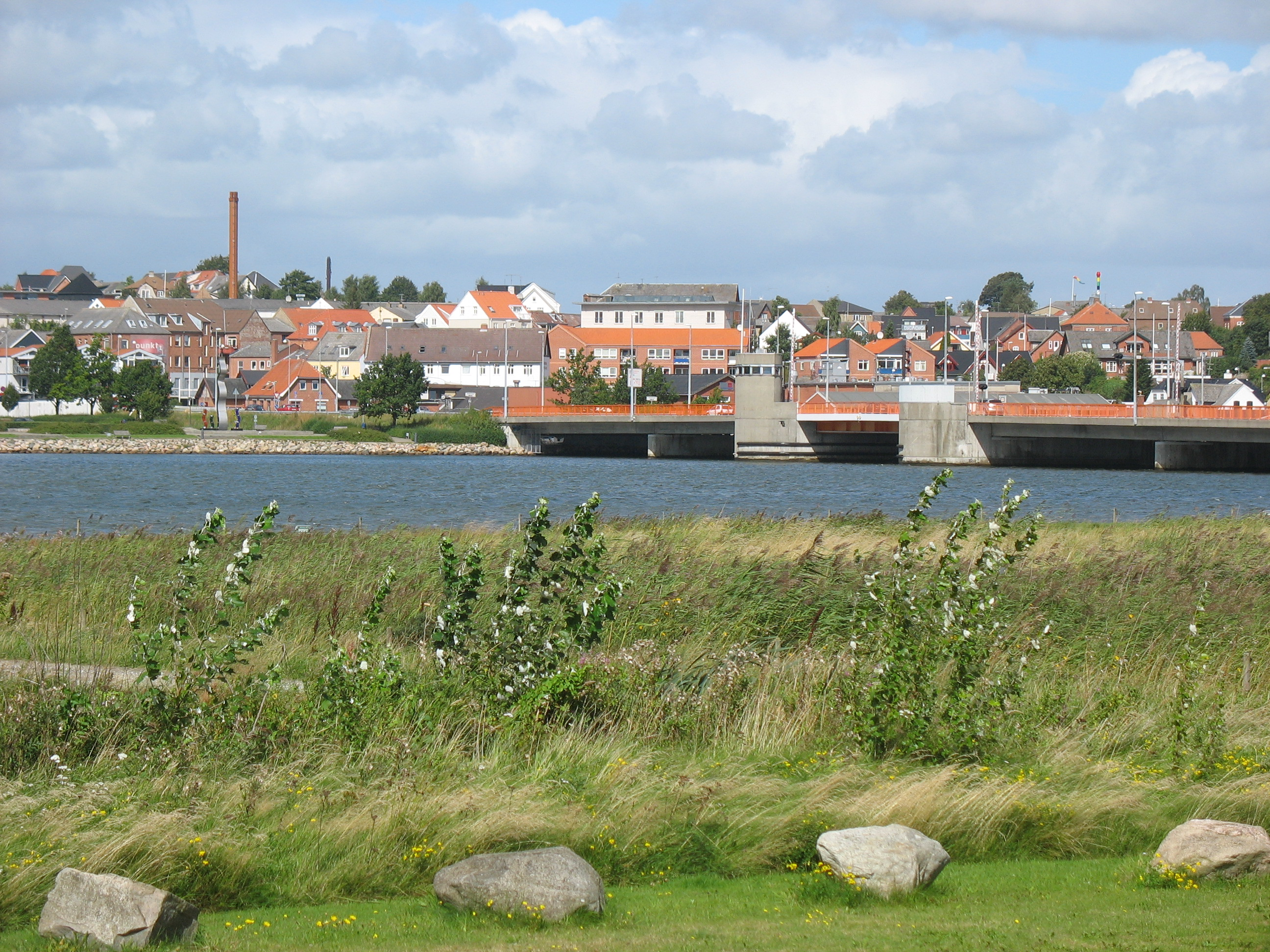 Hadsund by med Hadsundbroen til højre